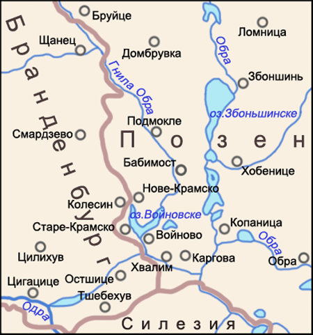 Карта окрестностей Бабимоста: Хвалим, Нове-Крамско, Старе-Крамско, Подмокле, Домбрувка. Границы 1910-х годов. Источник: Nitsch K. Rzekomi "wendowie" w Wielkopolsce (польск.) // Ziemia. — Warszawa, 1912. — 24 Grudzień (t. III, nr 52). — S. 834